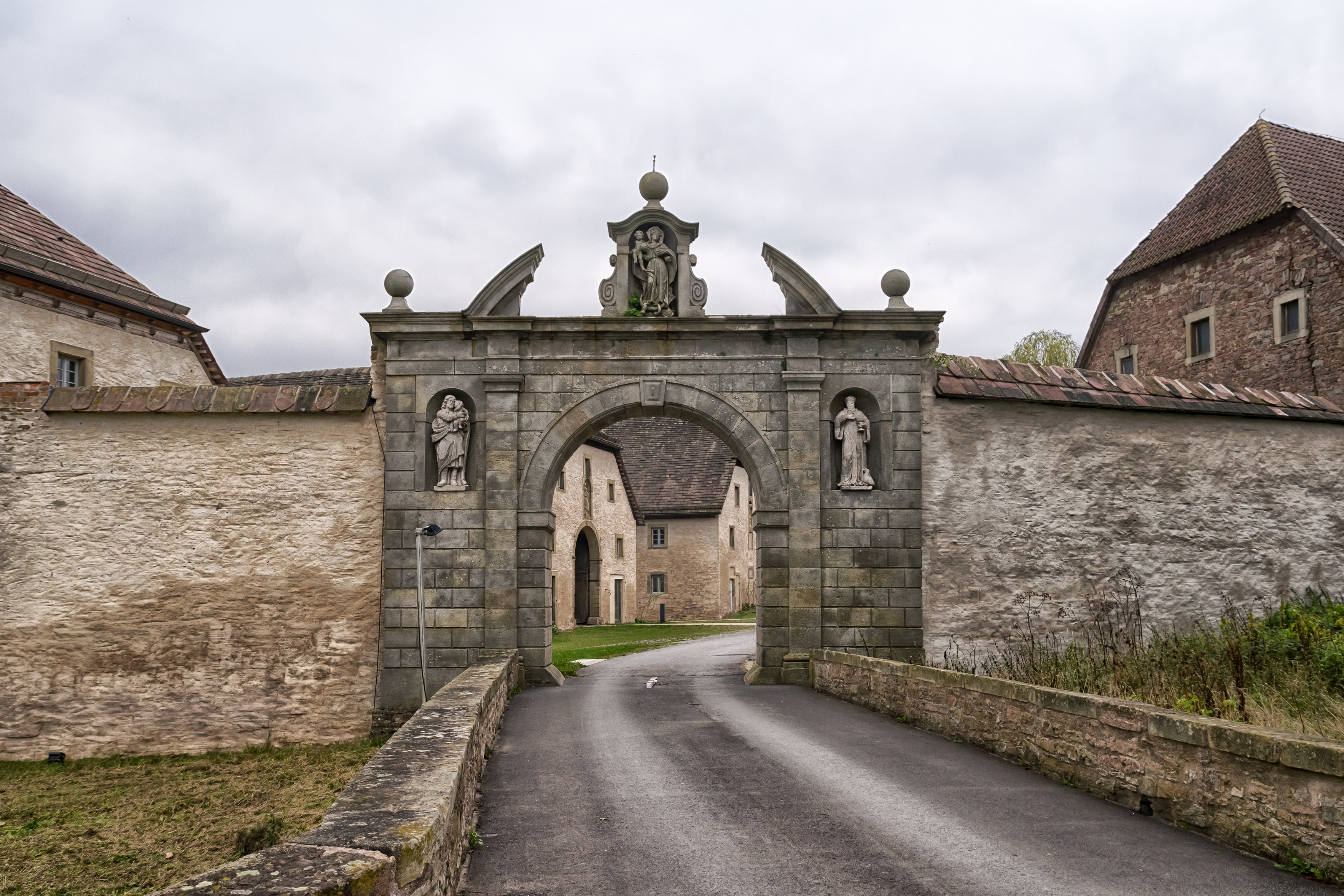 Abtei Marienmünster in Marienmünster, Kreis Höxter; Torbogen